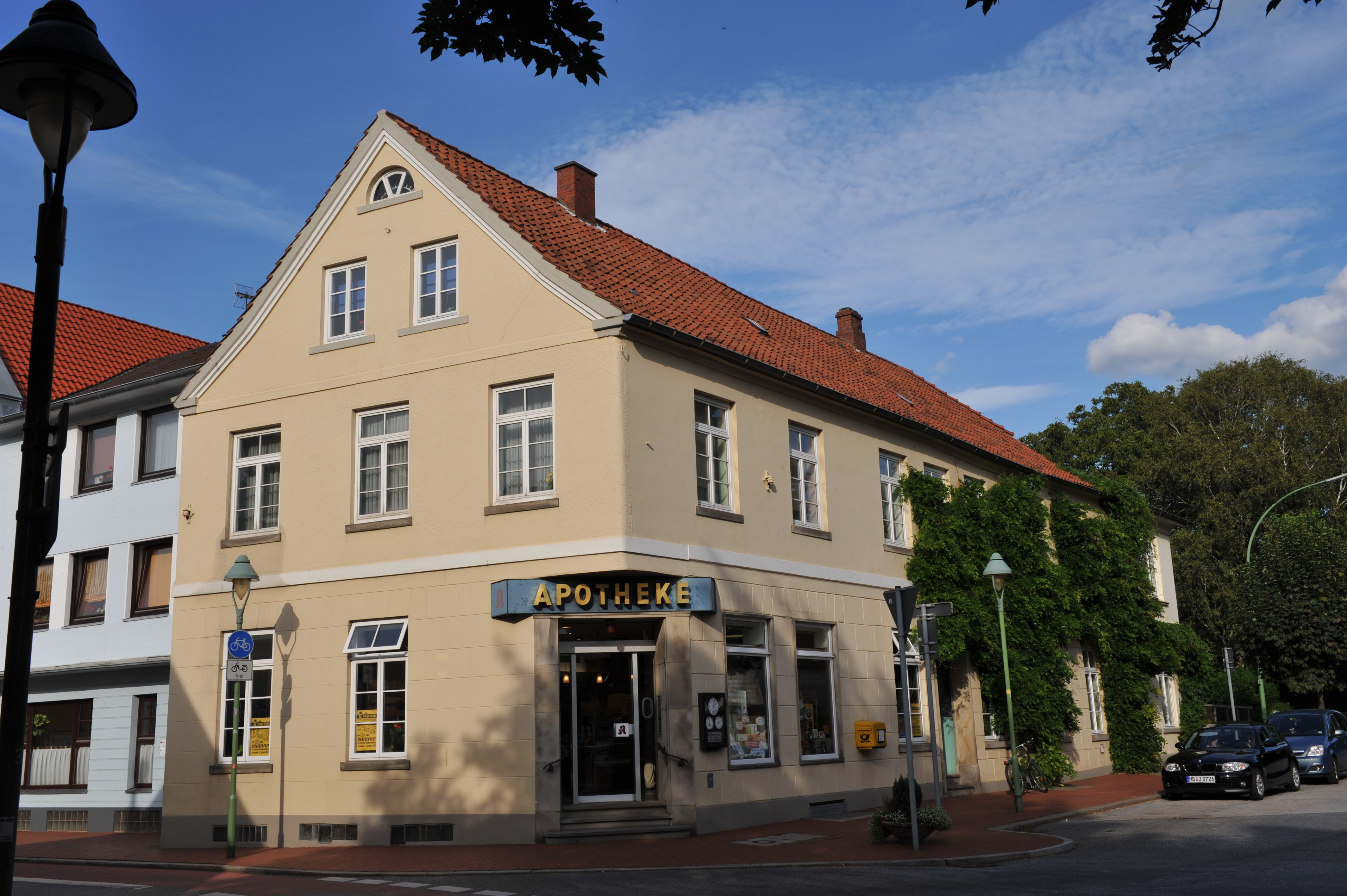 Historical building in Bremerhaven, northern Germany Alte privilegierte Apotheke Lehe, Poststraße 1, um 1680, Umbauten nach 1801 und um 1900 Das abgebildete Objekt ist ein geschütztes Kulturdenkmal in der Freien Hansestadt Bremen, mit der Nr. 1583 beim Landesamt für Denkmalpflege registriert.